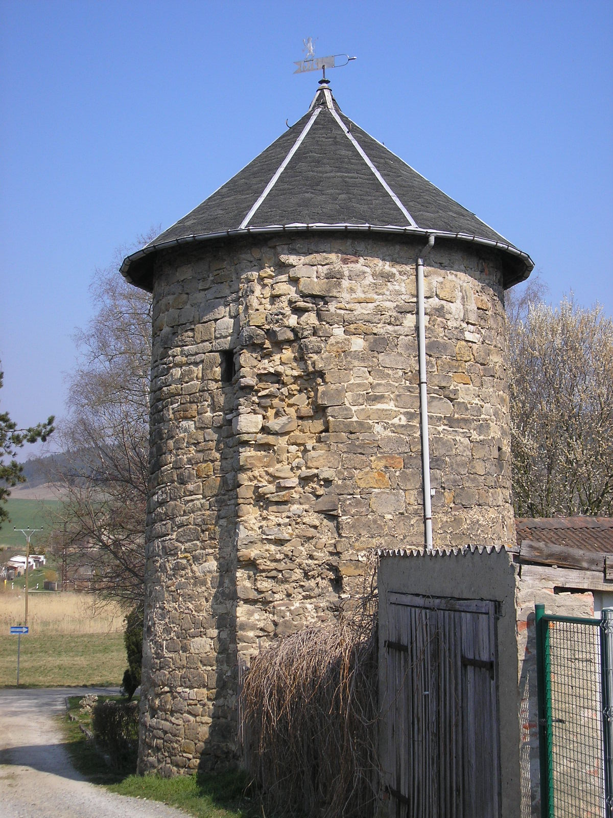 Ein Turm der Stadtmauer von Remda (Thüringen).